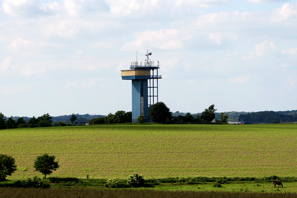 Der Funkturm auf einem Feld im Radeberger Ortsteil Großerkmannsdorf.